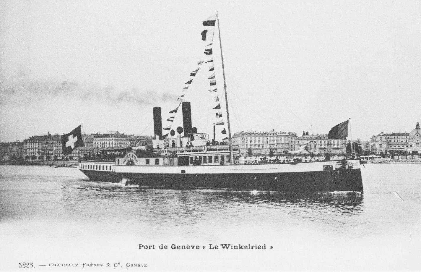 Ansichtskarte mit Raddampfer «Winkelried» im Hafen von Genf. Postkarte Nr. 5228 von Charnaux Frères & Cie, Genève. Originaltitel: Port de Genève «Le Winkelried»